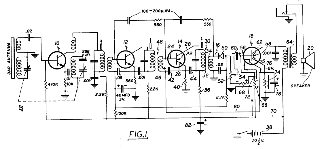 Regency TR-1 Schaltplan